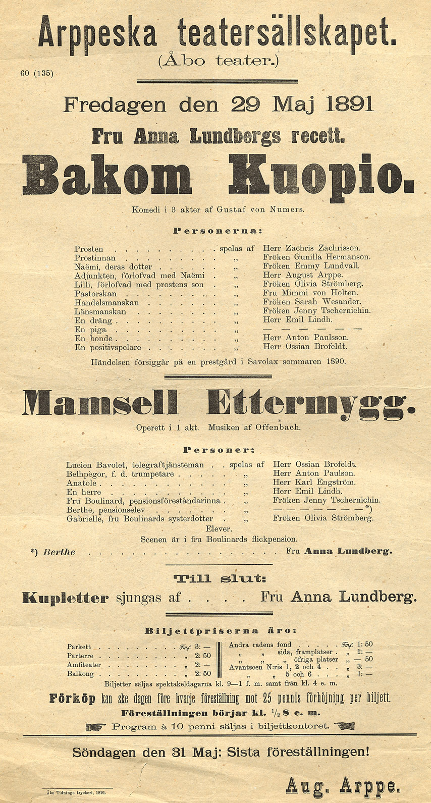 Affisch för teaterföreställningarna 1. Bakom Kuopio och 2. Mamsell Ettermygg på Åbo Svenska Teater 29.5.1891. Gustaf von Numers är regissör till den första pjäsen.